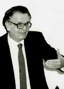 scattata aFirenze in occasione di un suo intervento pubblico